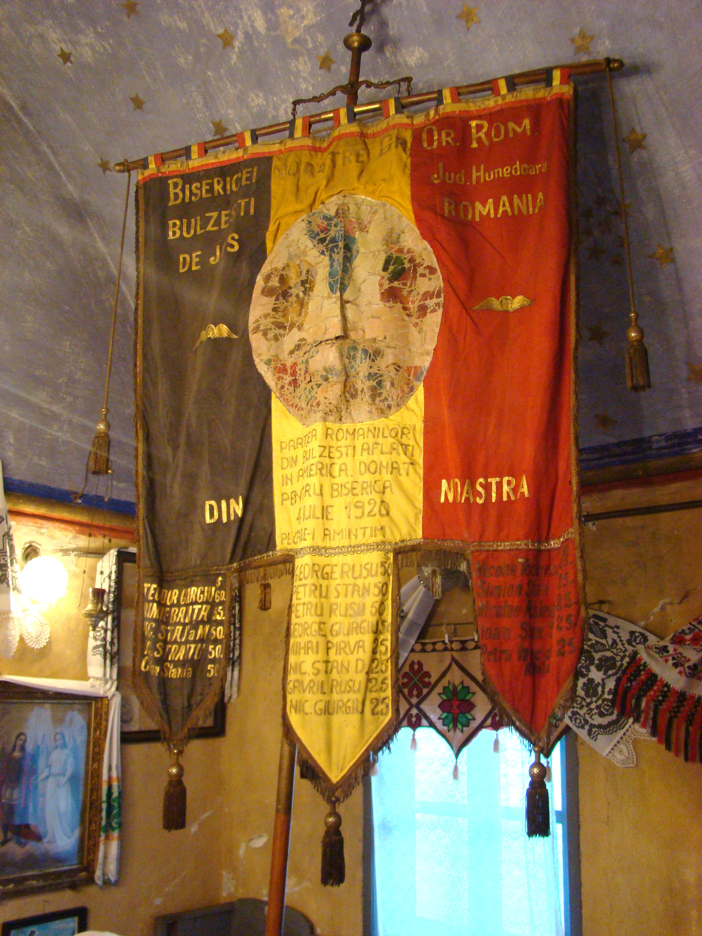 Biserica de lemn din Bulzeștii de Jos